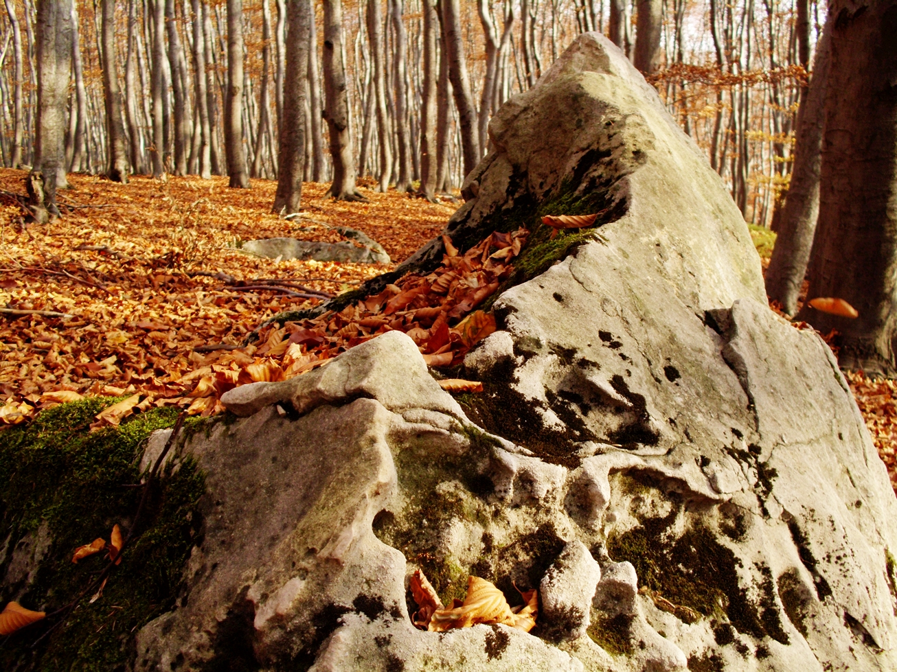 Formacja skalna na Bukowej Górze w Dąbrowie Górniczej